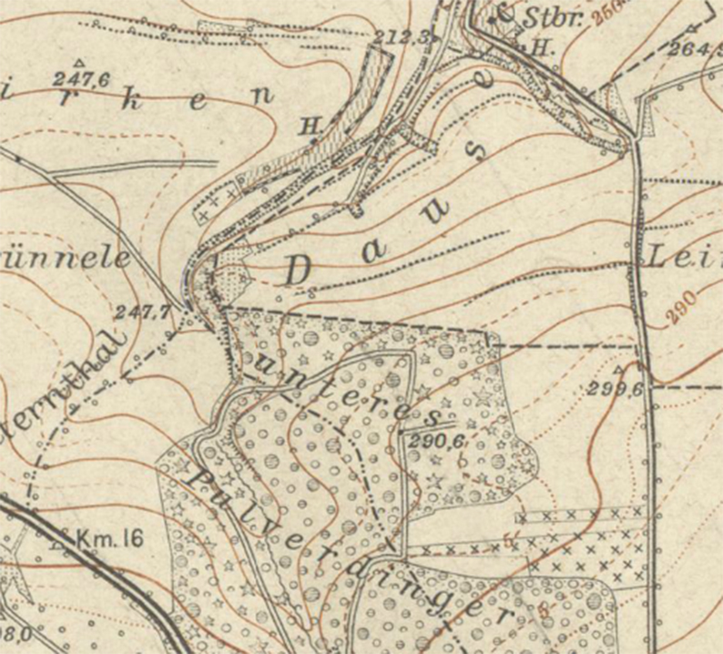 Burgstall der Dauseck auf der topographischen Karte von 1897 (Messtischblatt 43/TK 7020)